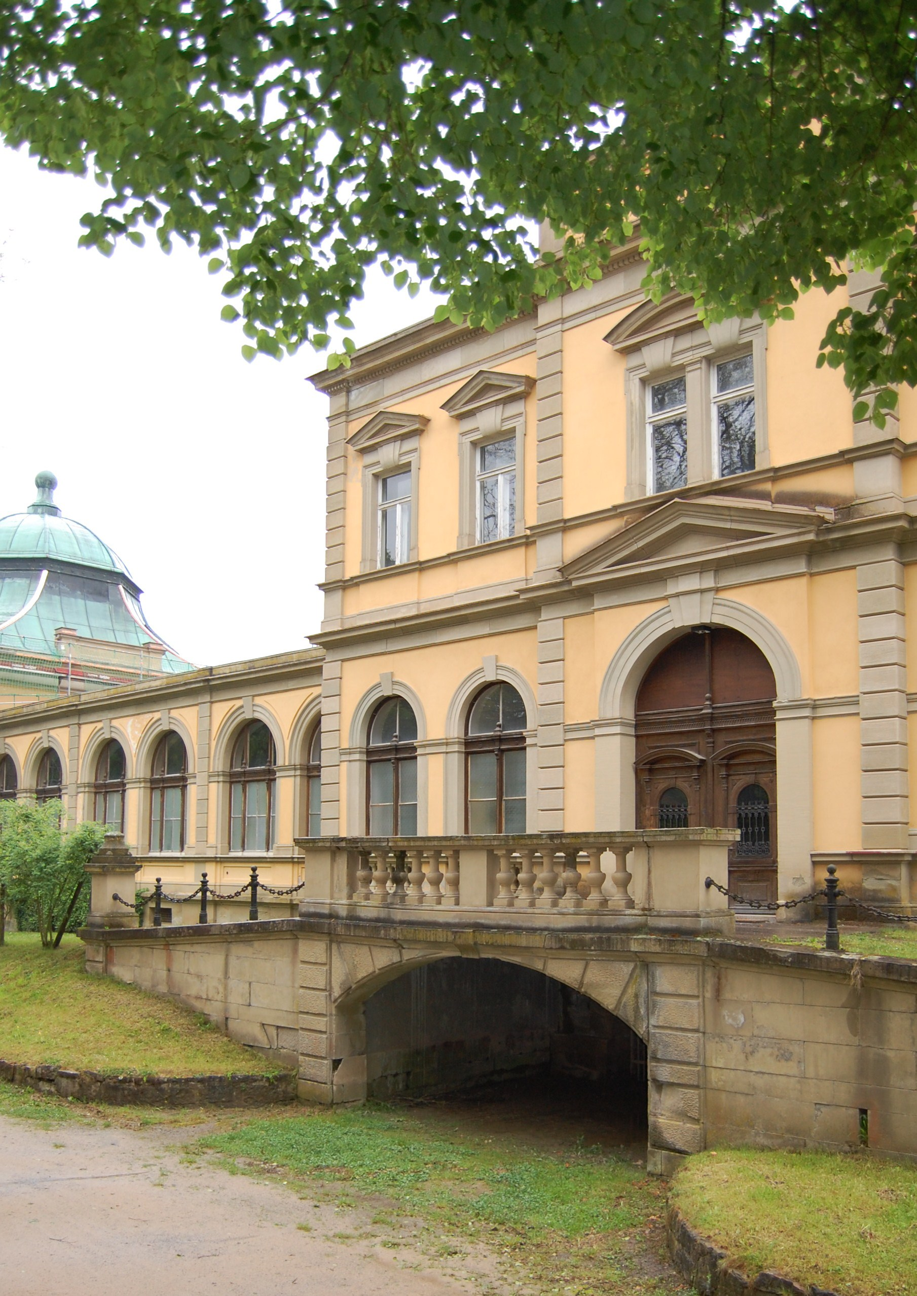 Luitpoldbad (Südtrakt) in Bad Kissingen, um 1900 mit seinen 236 Badekabinen das größte Bad Europas, seit Ende der 1970er Jahre ungenutzt leerstehend